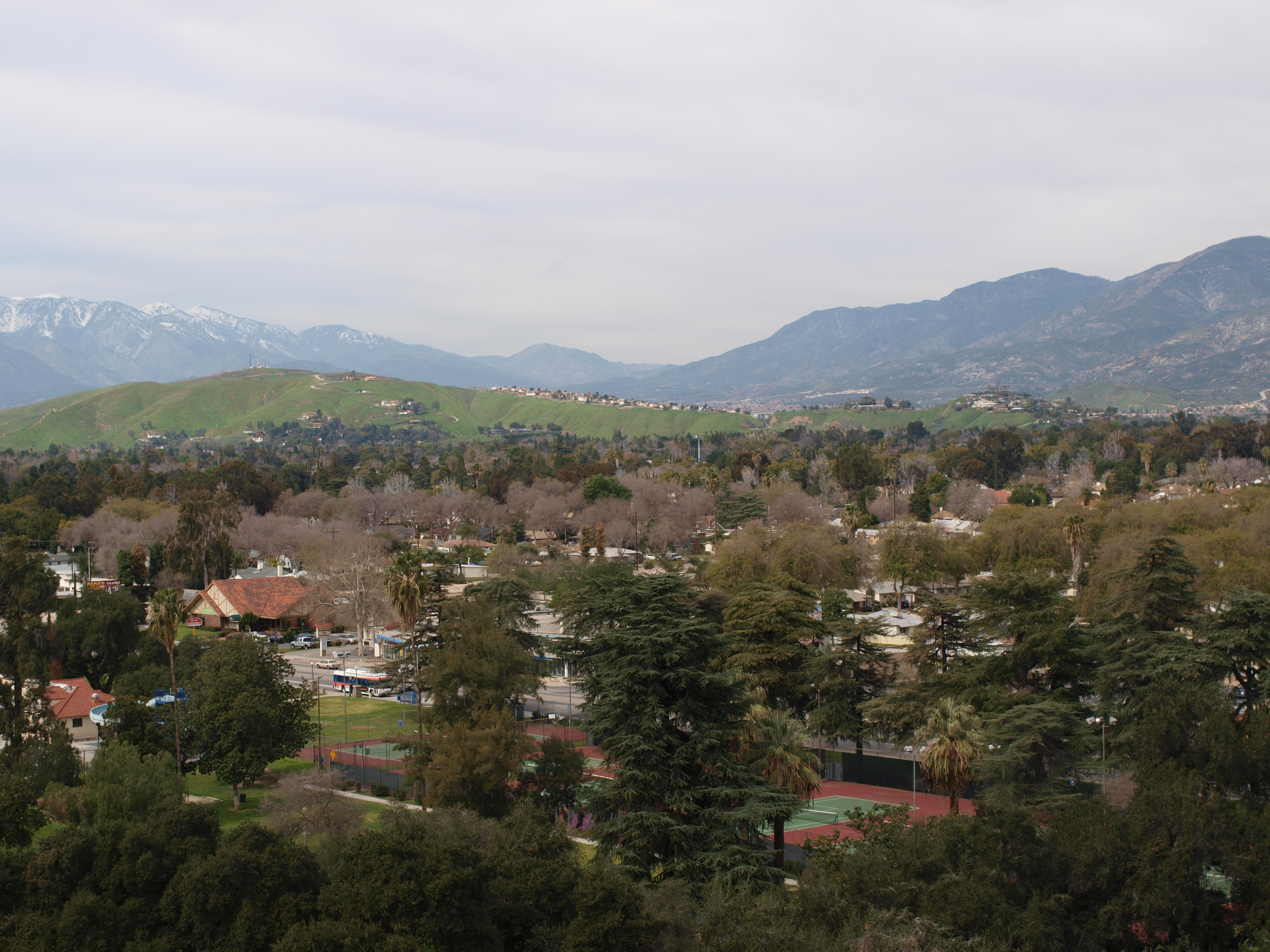 San B